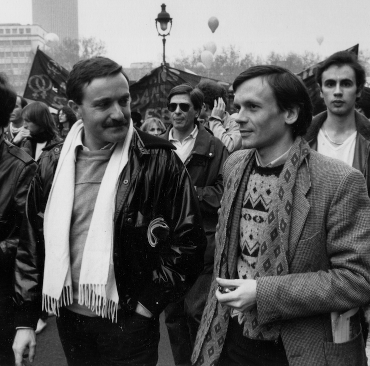 Yves Navarre et Jean Le Bitoux à la manifestation pour les droits gays et lesbiens, Paris 4 avril 1981.